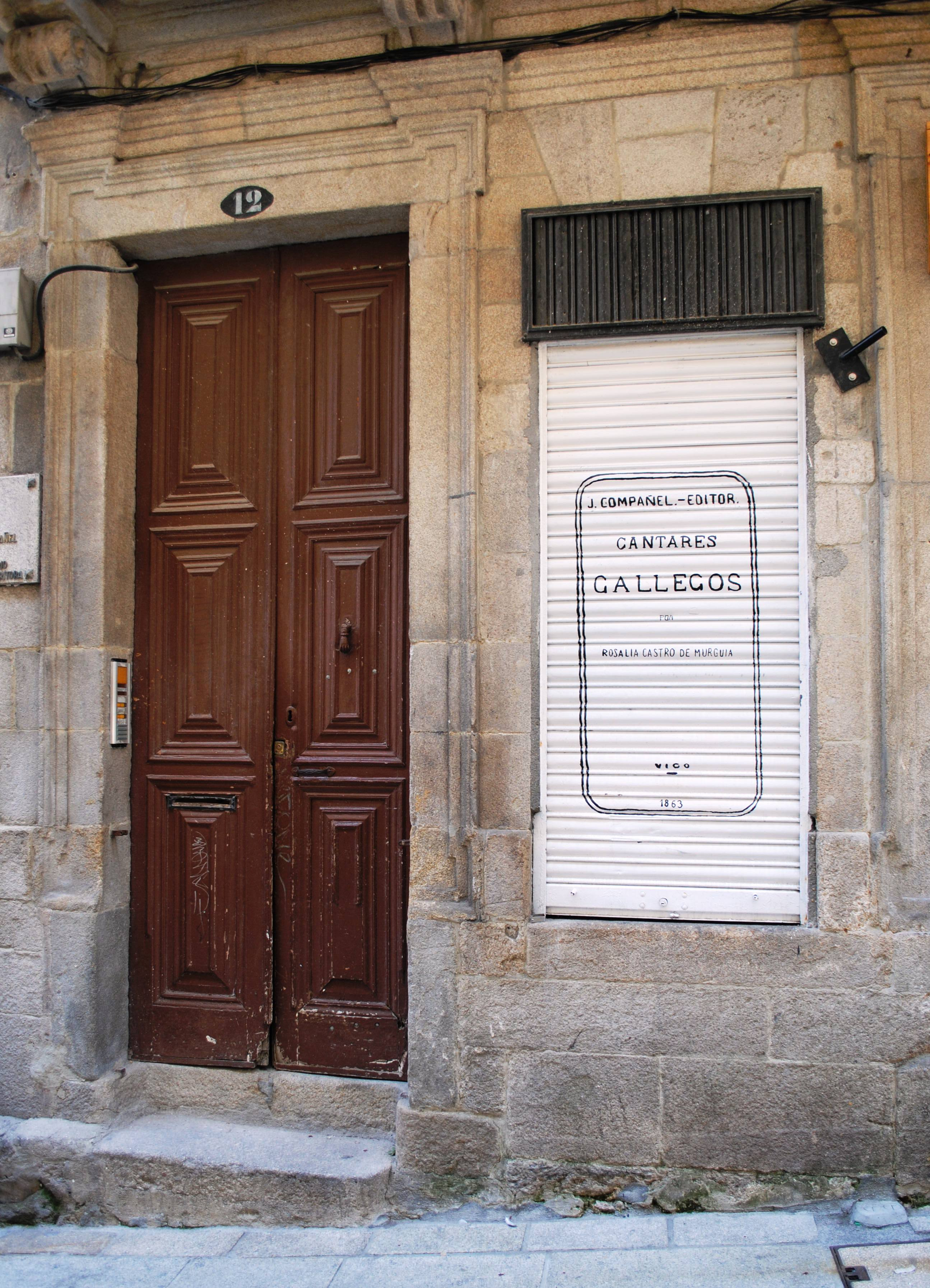 Vexa o título e as categorías.